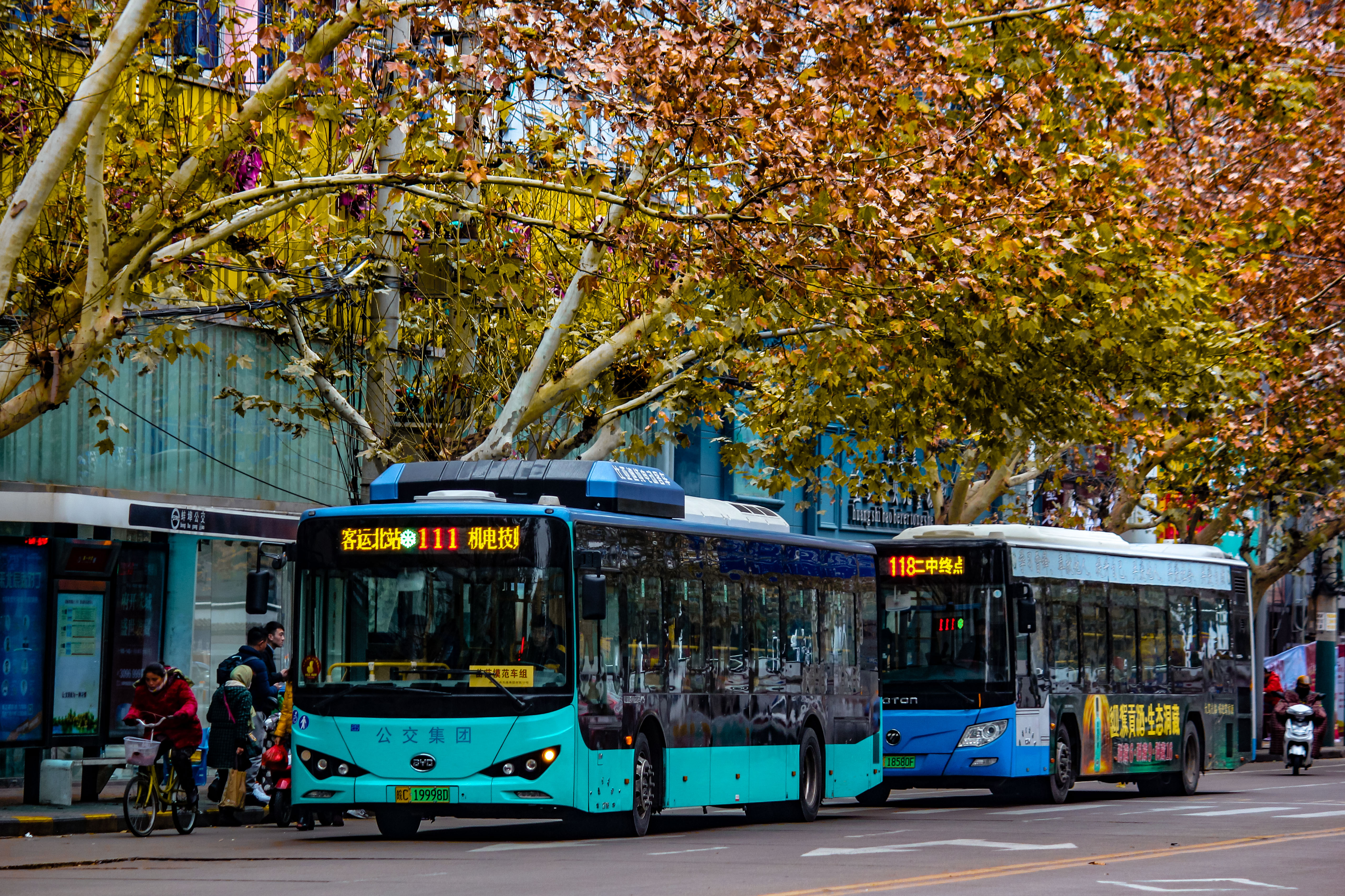 蚌埠公交111路在第一中学站。